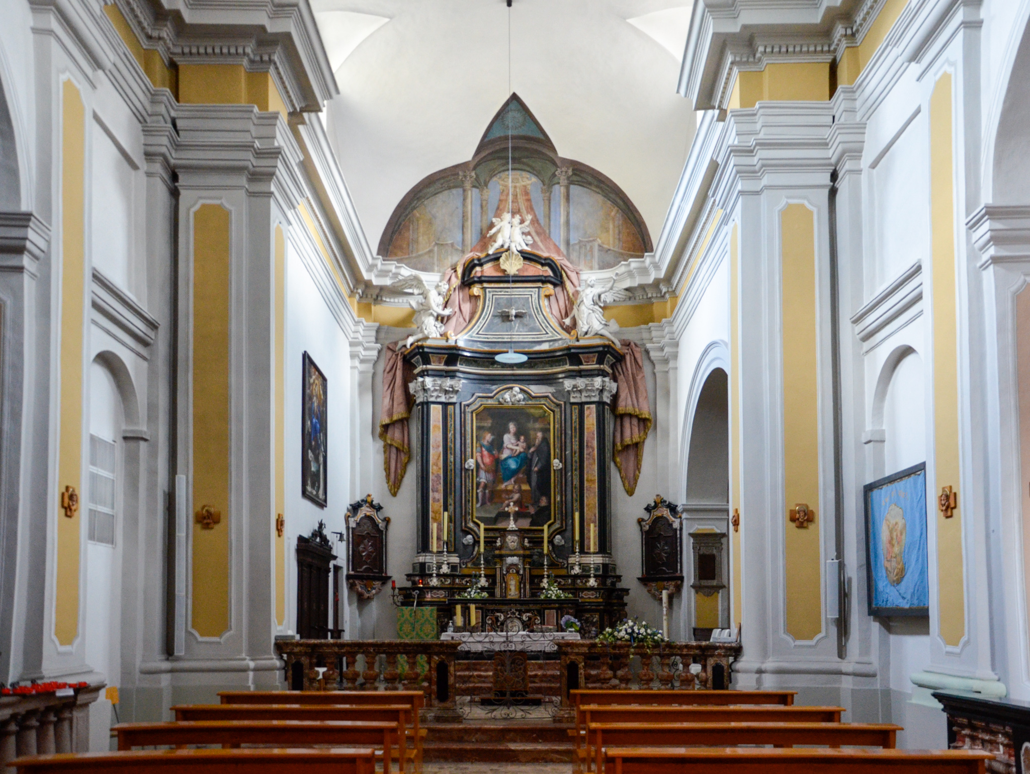 Interno della chiesa parrocchiale di San Michele Arcangelo di Brusino Arsizio